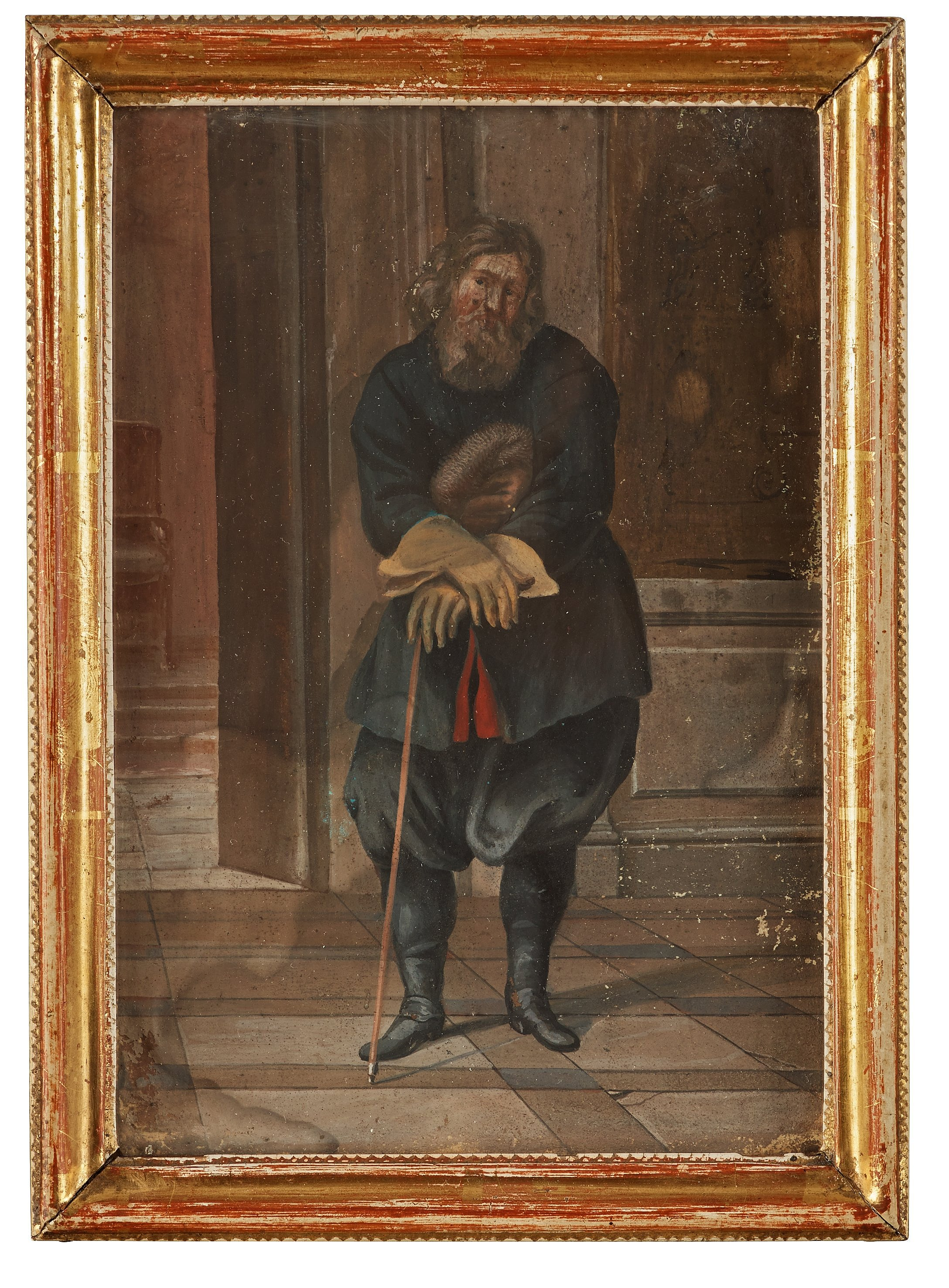 Bondeståndets talman Peder (Per) Olofs:son, av porträtterad av David Klöcker Ehrenstrahl. Peder var bondeståndets talman vid Riksdagen 1686.